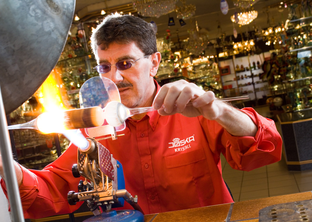 Joska Kristall Glasparadies Kunstglasbläser / Apparateglasbläser